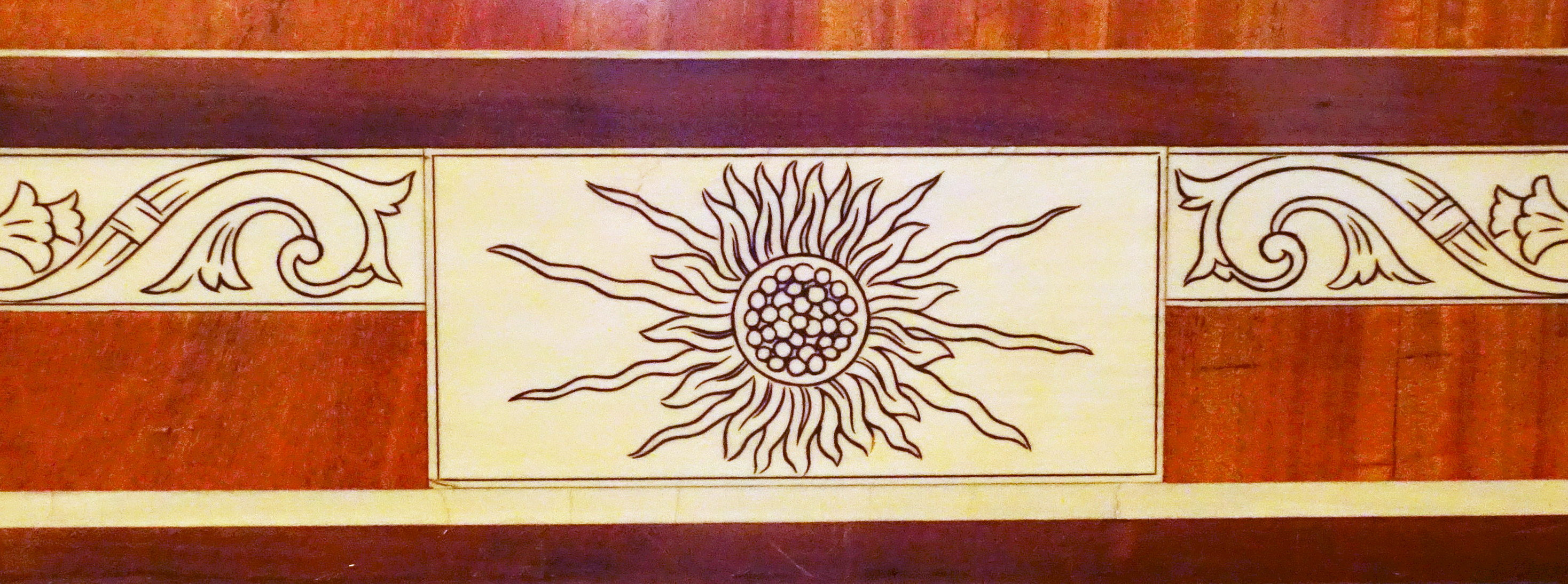 Tändstickspalatset Sessionssal, bordet, intarsia